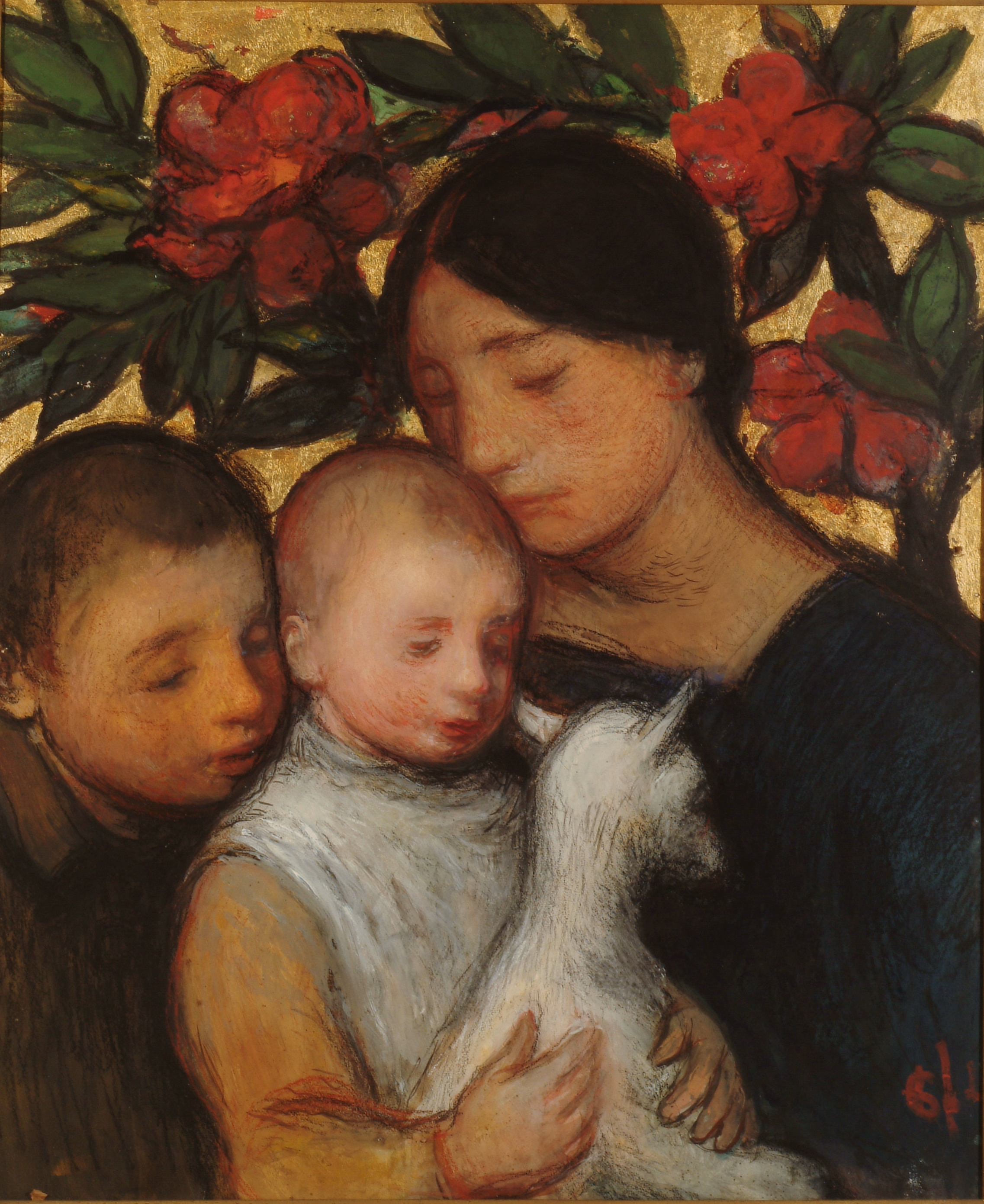 aquarel ( Jakob Smits ( Jakob Smits Museum (